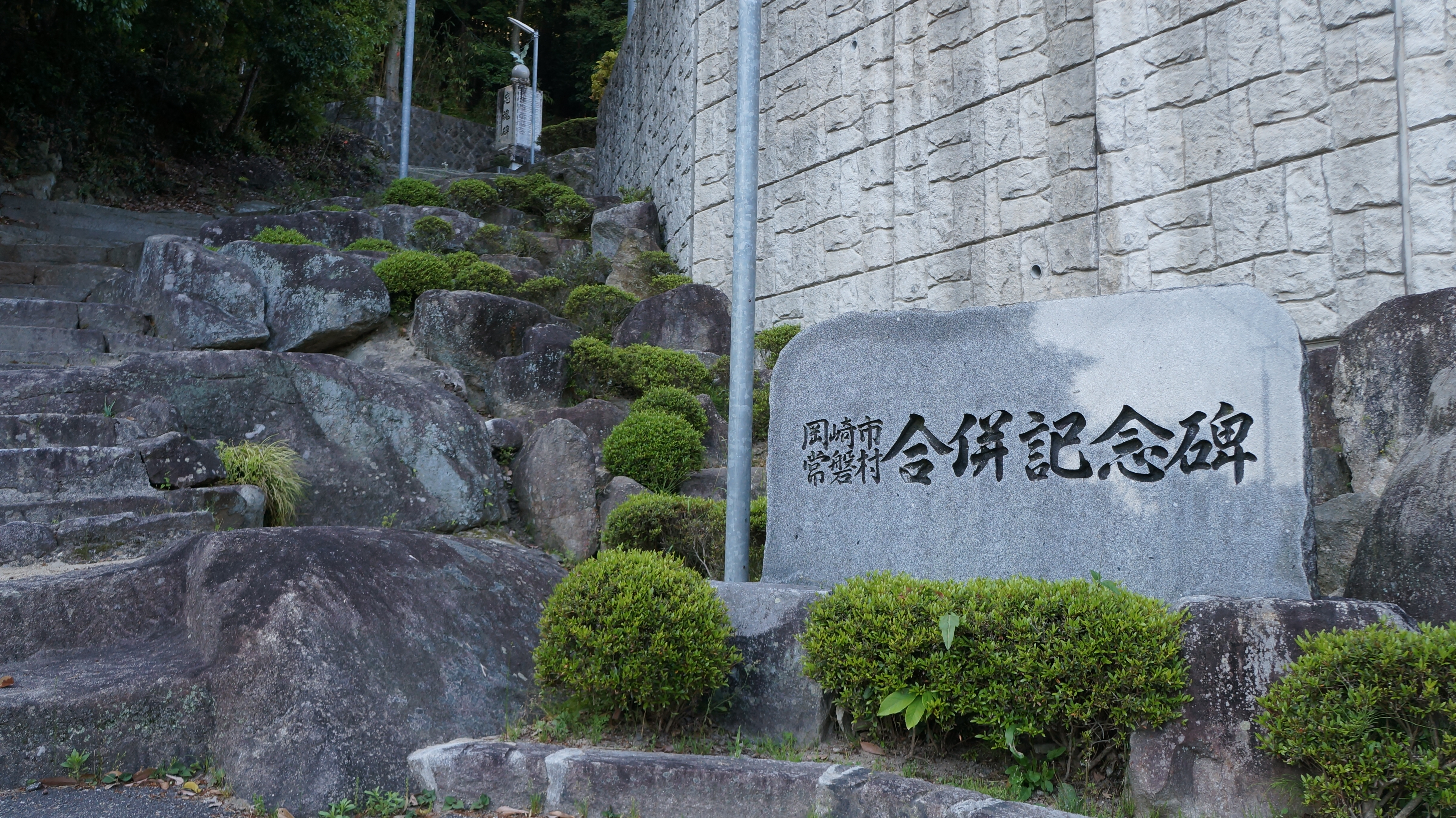 愛知県常磐村と岡崎市の合併記念碑。岡崎市滝町（旧常磐村）の常磐中学校前に設置されている。